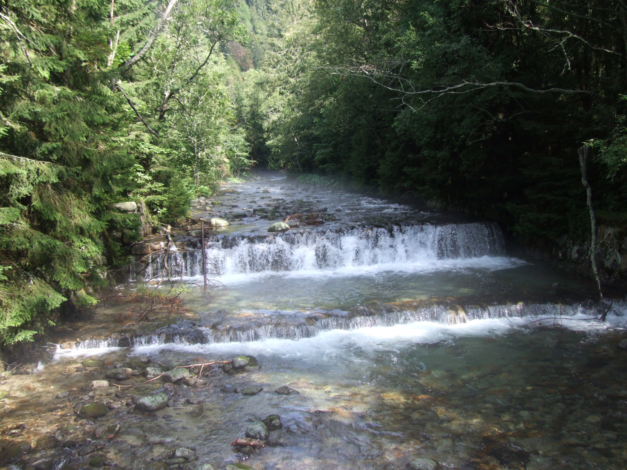 Raczkowy Potok (West Tatra Mountains)